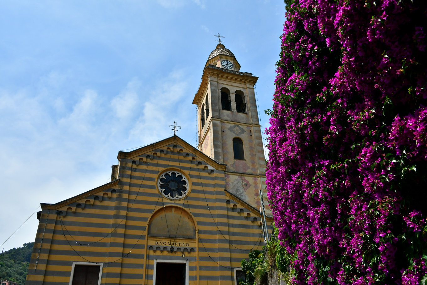 St. Martin, Portofino